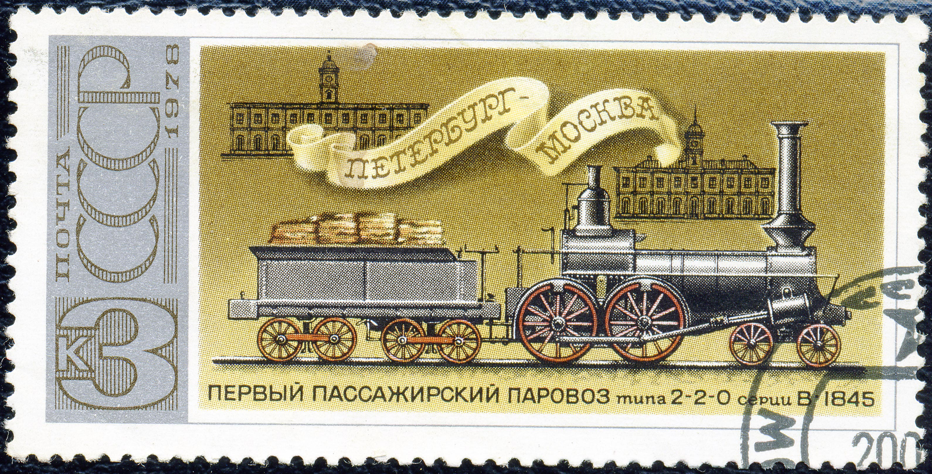 Почтовая марка СССР. 1978. Первый пассажирский паровоз типа 2-2-0 серии В